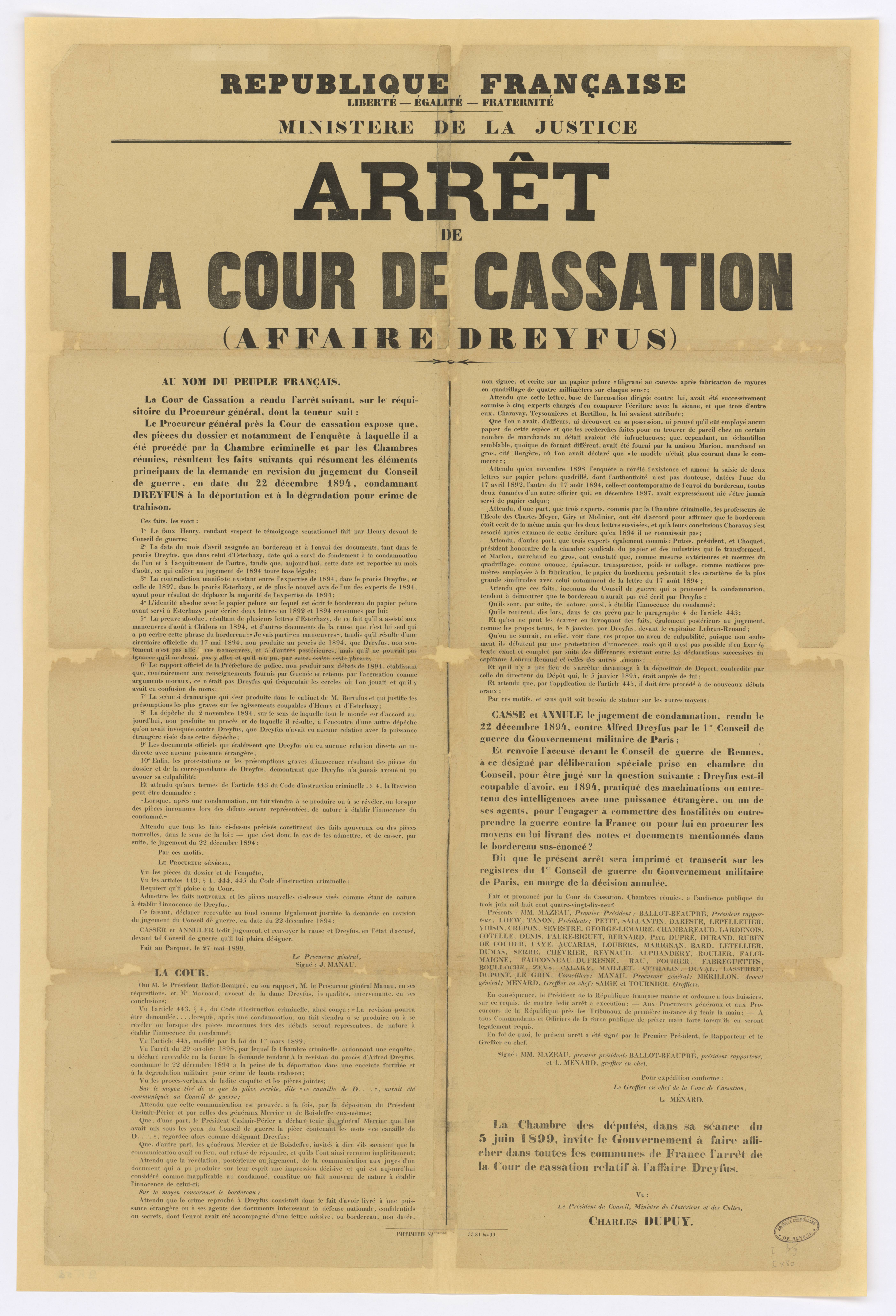 Affaire Dreyfus. Arrêt du 3 juin 1899 prononcé par la cour de Cassation, qui casse le jugement de condamnation d'Alfred Dreyfus prononcé en 1894 par le Conseil de Guerre de Paris, et renvoie l'affaire devant le Conseil de Guerre de Rennes. 1899, Imprimerie nationale, Paris. Archives municipales de Rennes, 9Fi51.